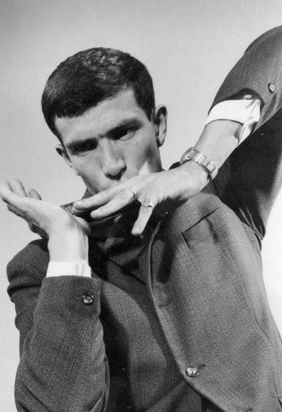 Photo du dessinateur de BD Francis (Francis Bertrand) jouant de l'harmonica